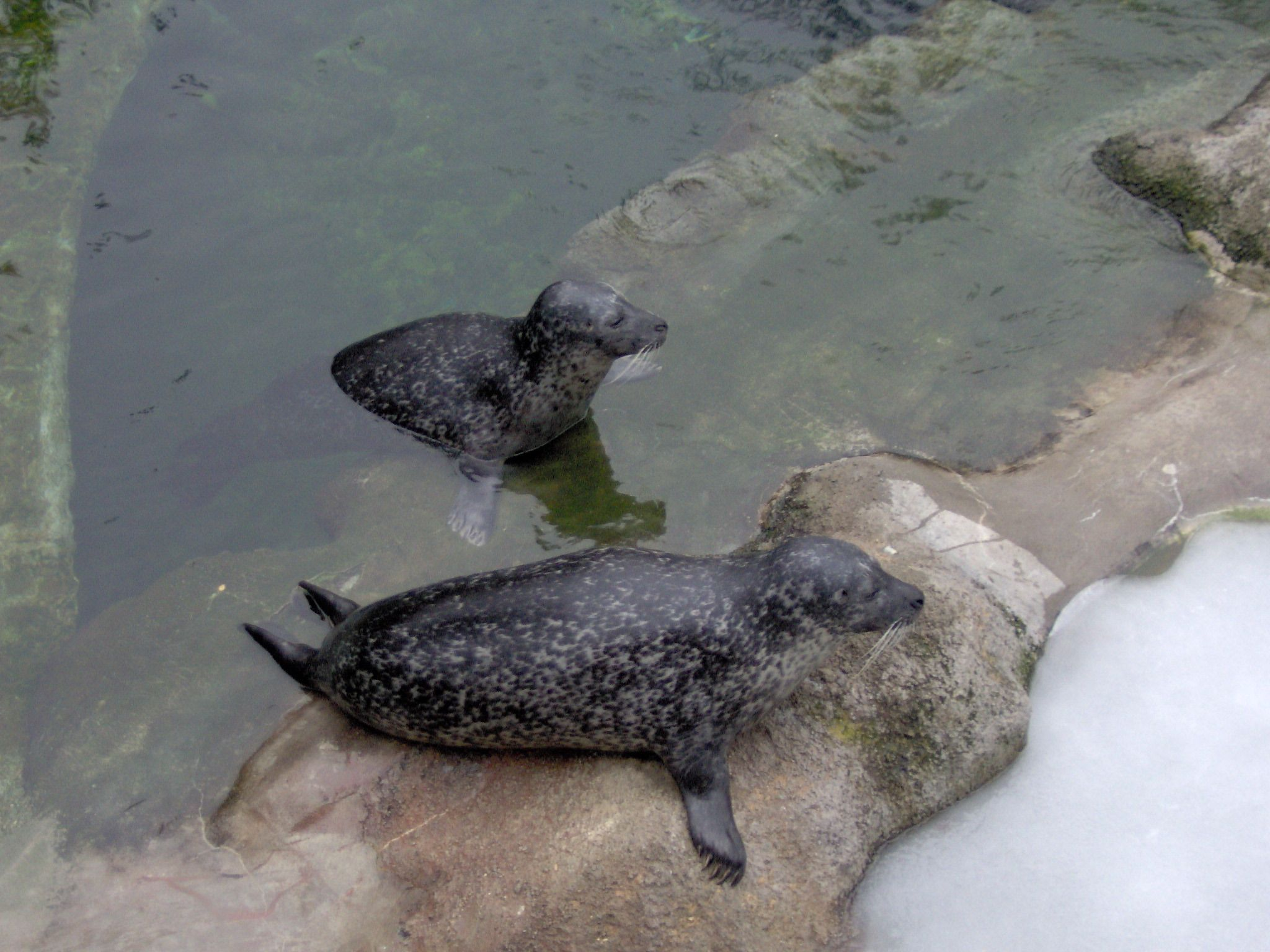 Phoca vitulina at Budapest Zoo